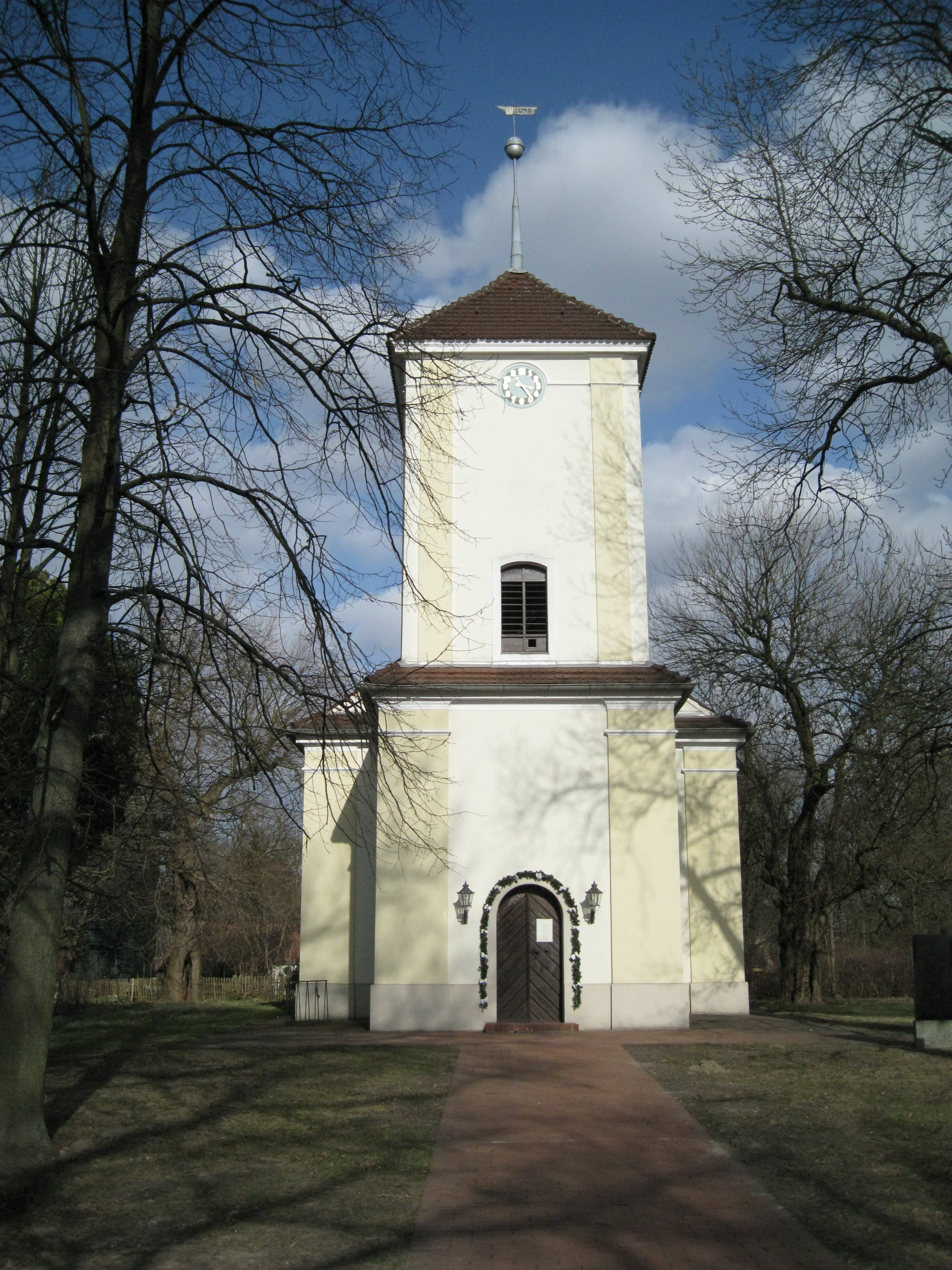 Dorfkirche Lübars, Ansicht vom Turm